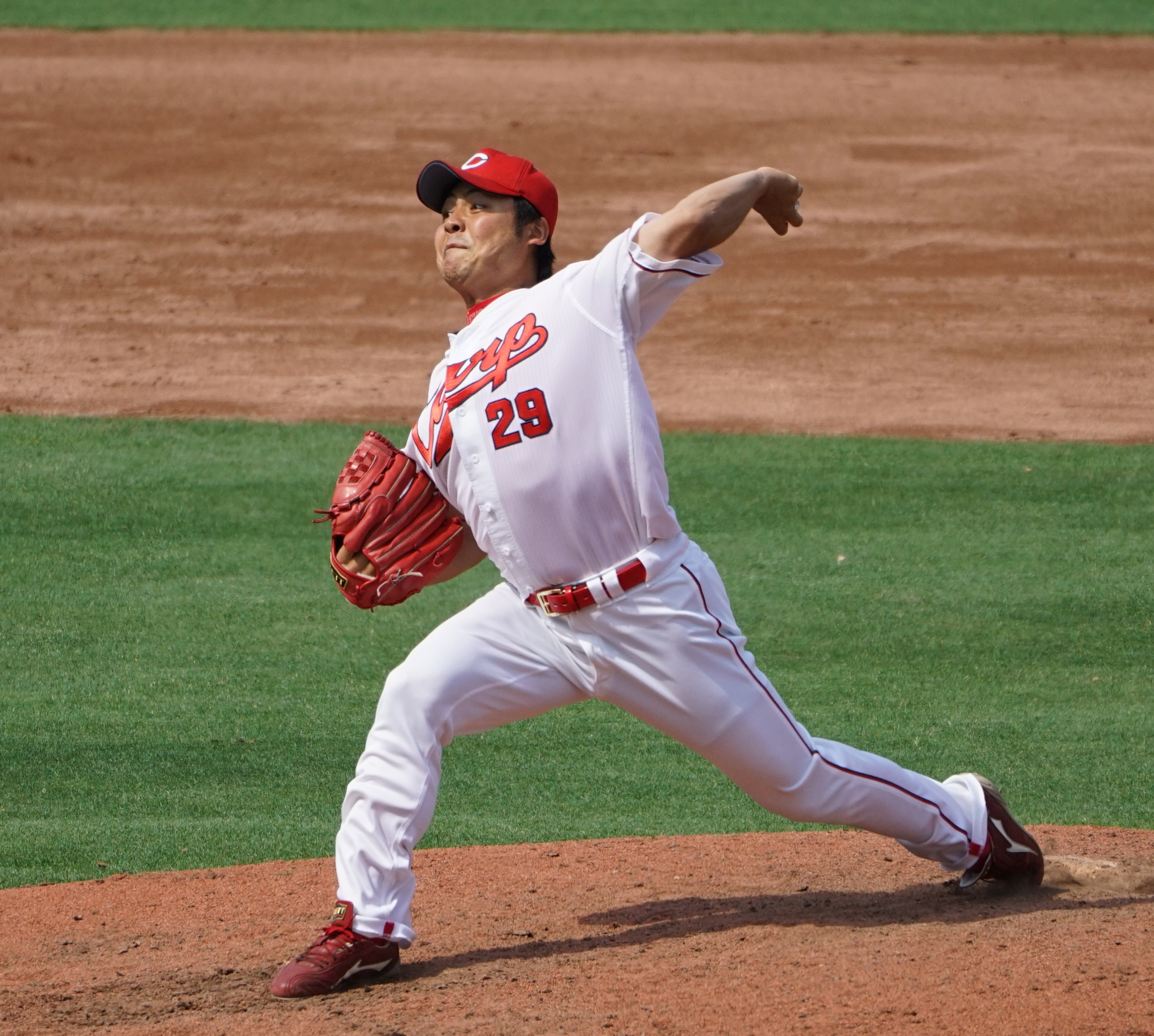 2017年6月10日、MAZDA Zoom-Zoom スタジアム広島の2軍戦（対オリックス）にて